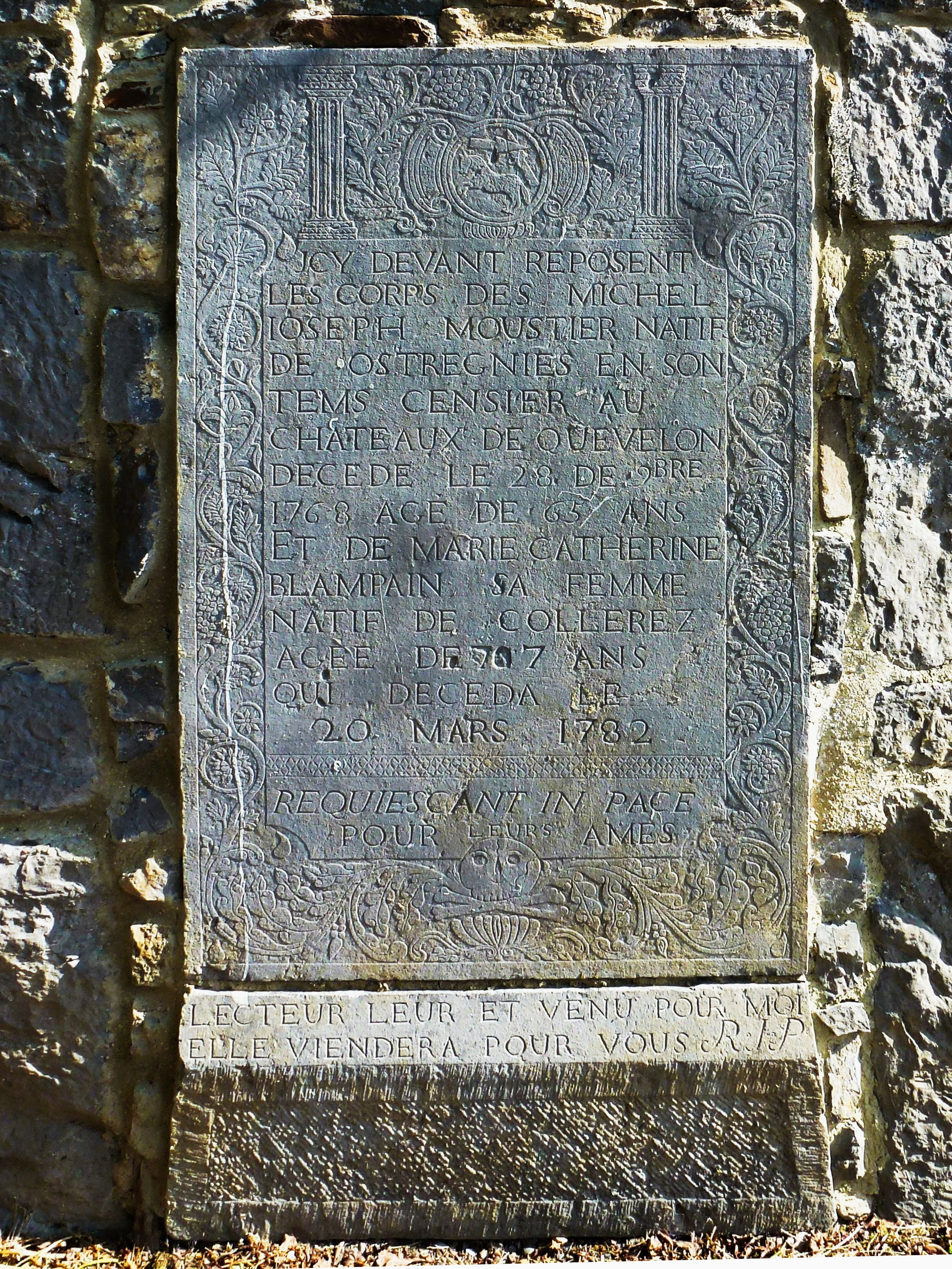 Dalle funéraire Headstone du censier Michel Joseph Moustier Quiévelon Nord.- France.